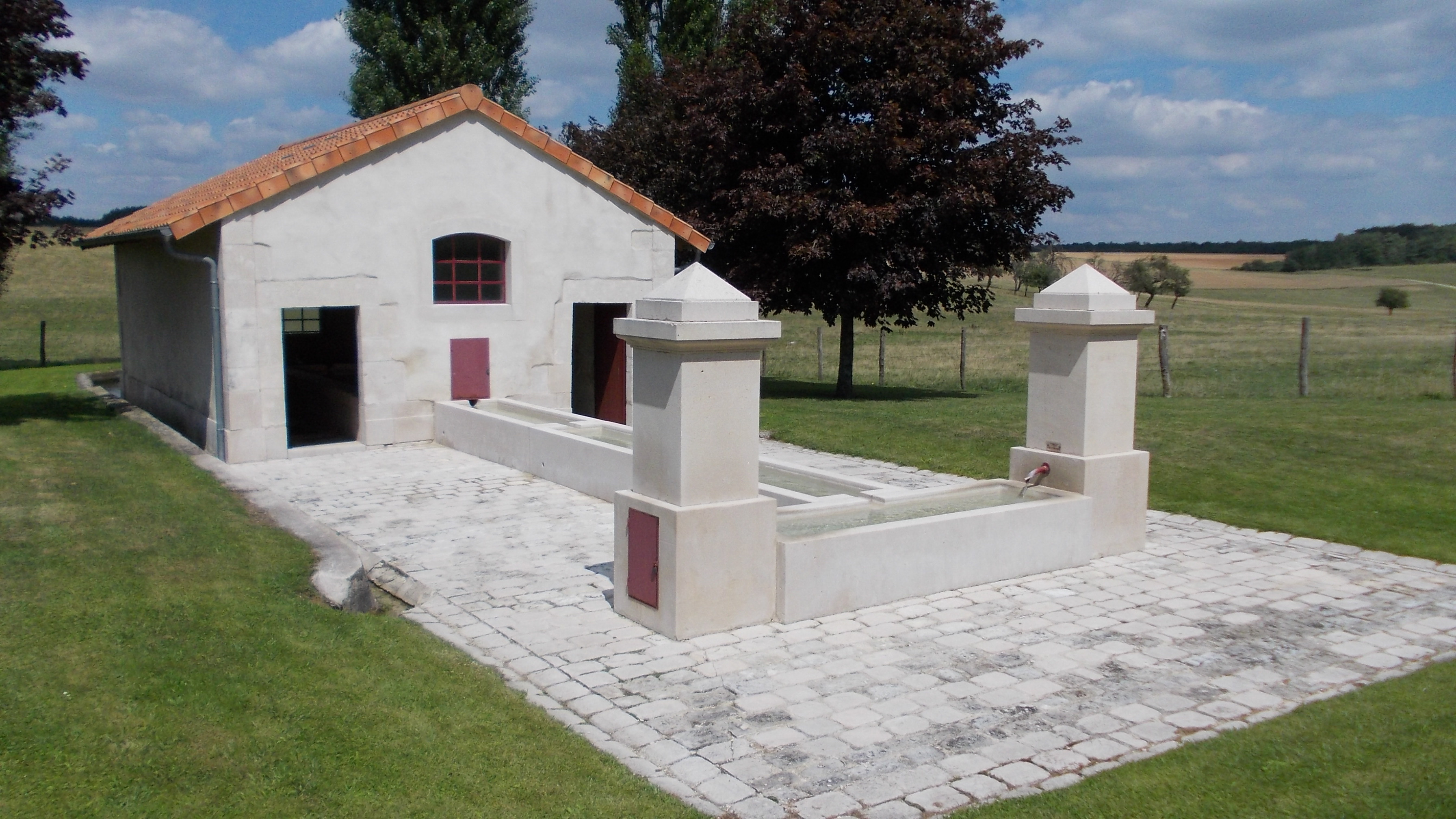 Lavoir de la commune Villeroy-sur-Méholle